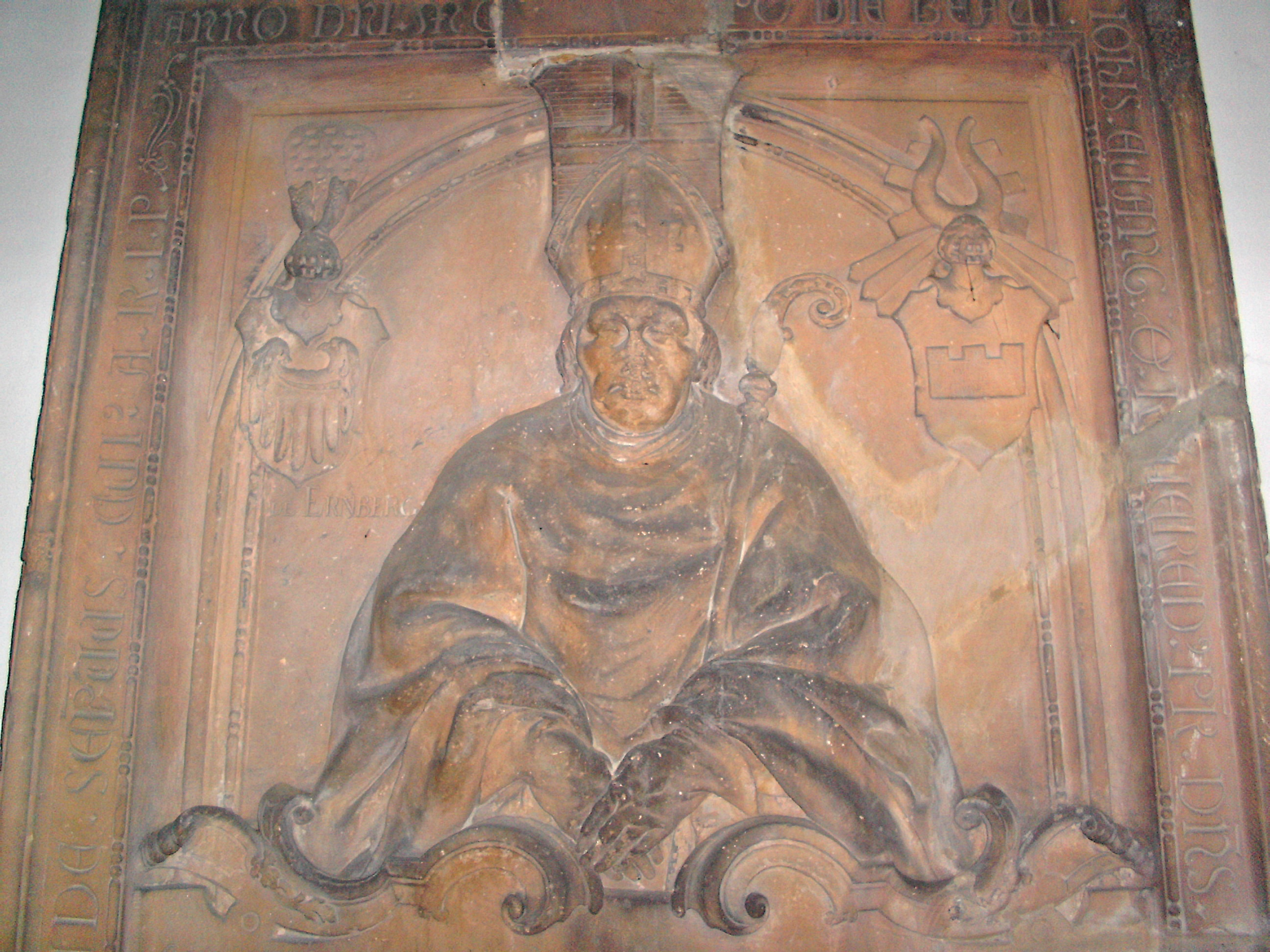 Speyerer Dom, Zweit-Grabplatte für Bischof Gerhard von Ehrenberg († 1363), von Vinzenz Möhring, 1775